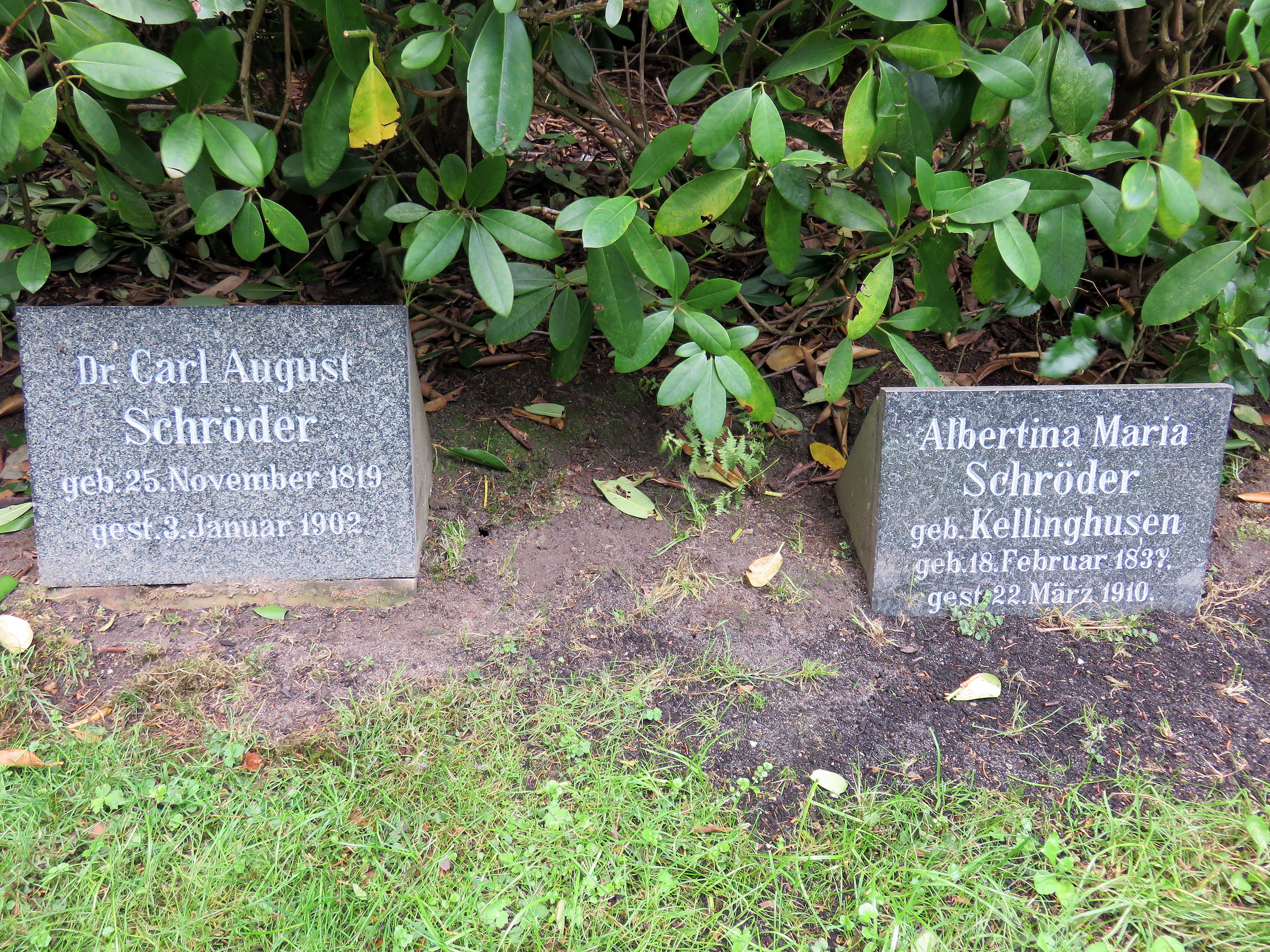 Kissensteine für den Hamburger Richter und Bürgerschaftsabgordneten Carl August Schröder (1819-1902)) und seine Ehefrau im Bereich der weitläufigen Familiengrabanlage “Christian Matthias Schröder” auf dem Hamburger Friedhof Ohlsdorf, Planquadrat U 21 (südlich Nebenallee östlich Kapelle 2). In derselben Reihe befinden sich die Kissensteine für deren Sohn, den Hamburger Rechtsanwalt und Bürgermeister Carl August Schröder (1855-1945) und dessen Ehefrau.